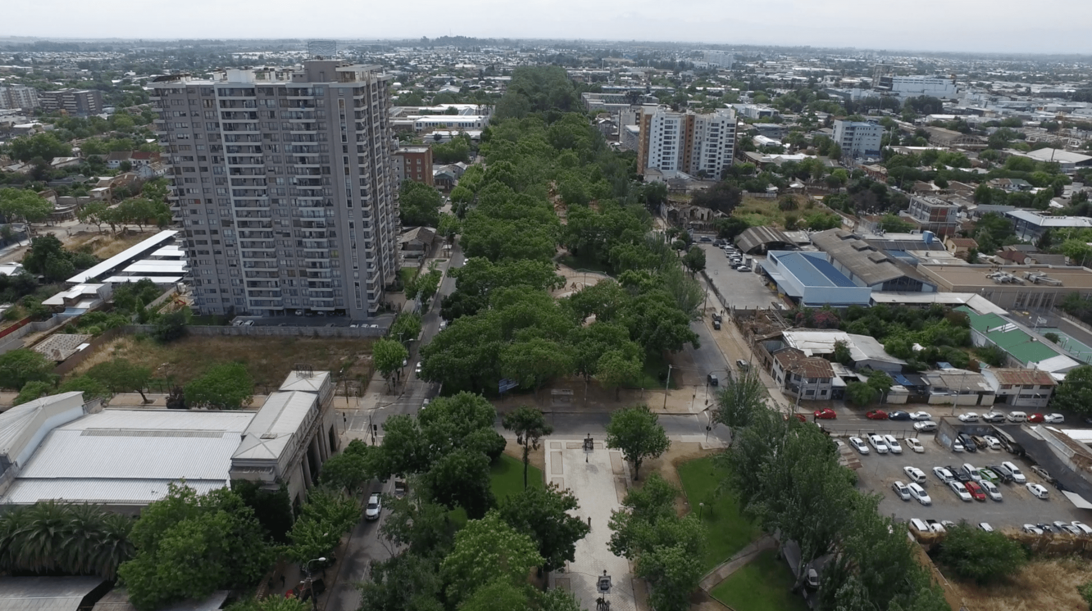 Juan Castro Prieto, Talca.